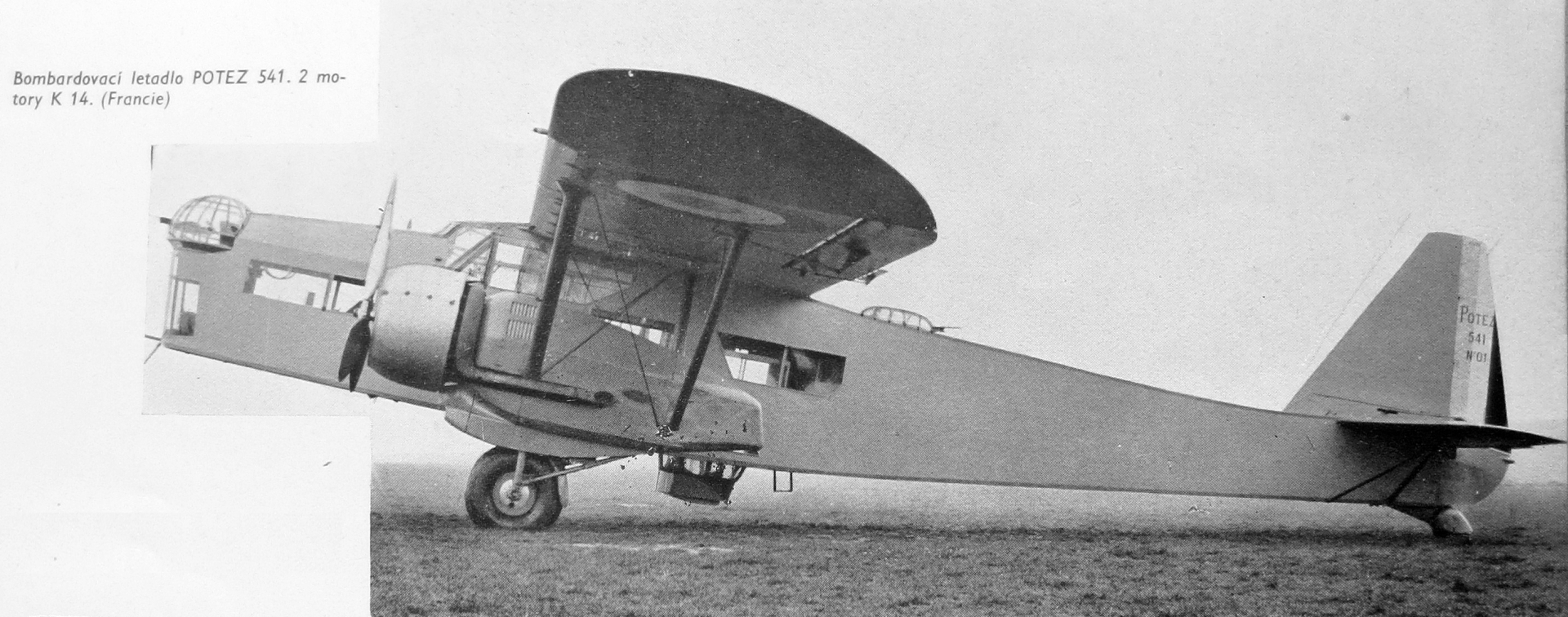 Potez 541 a Walter Mistral K 14